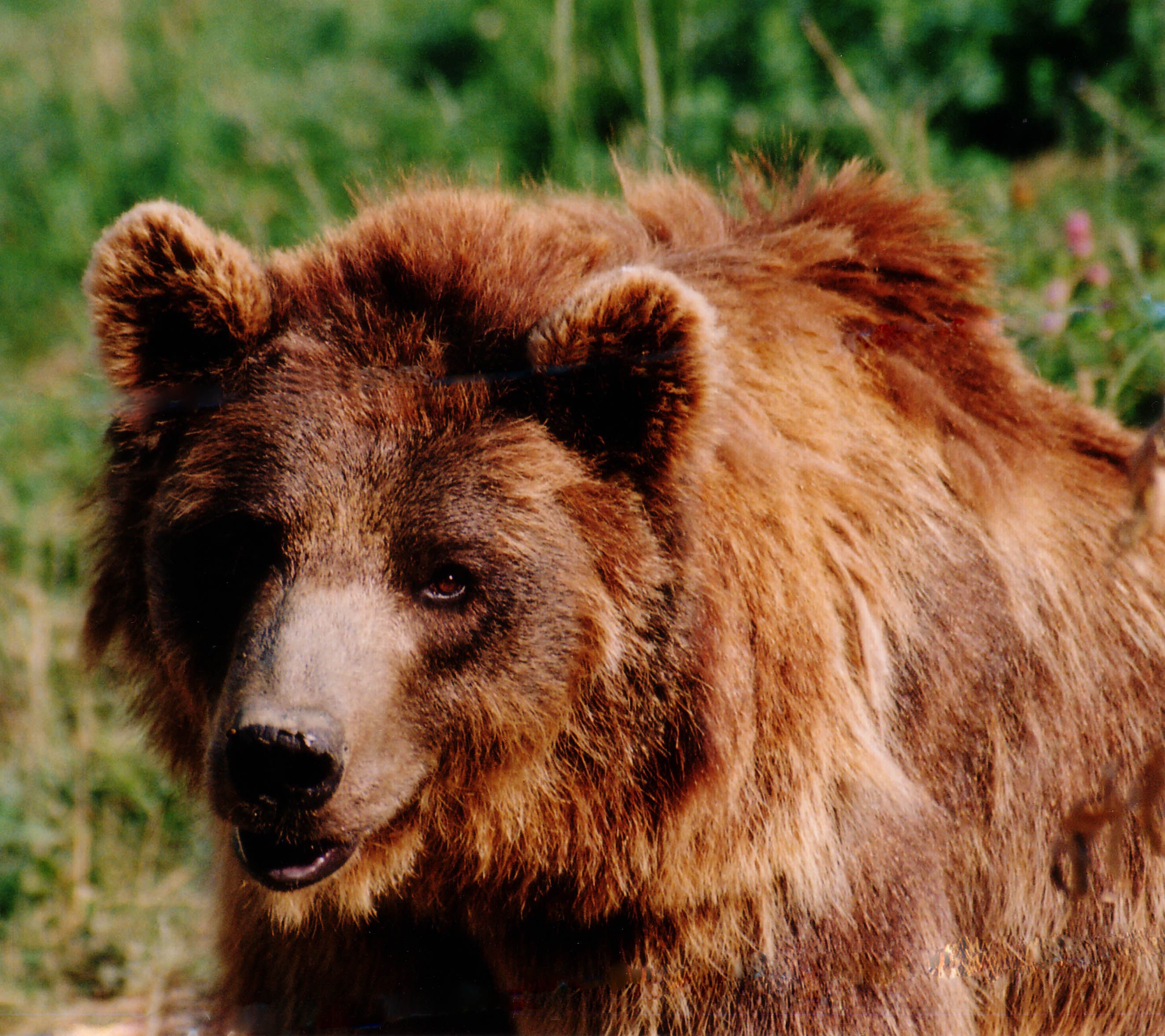 Realizada por Josu P, en el parque Karpin Abentura de Carranza, en junio de 2004. Tomada con Pentax MZ50, Sigma 70-210.